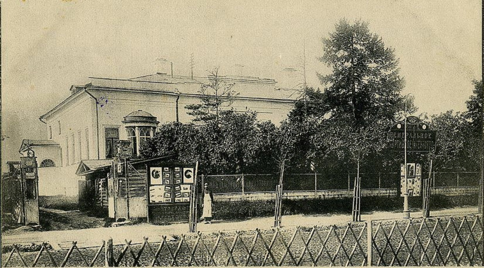 Дом Комоловых. С 1906 по 1908 год здесь размещалось Сергиево-Елизаветинское убежище. Позднее здание занимало Генеральное спортивное агентство. Ныне на месте этого дома Пограничная академия ФСБ России; Ленинградский проспект, дом 3.